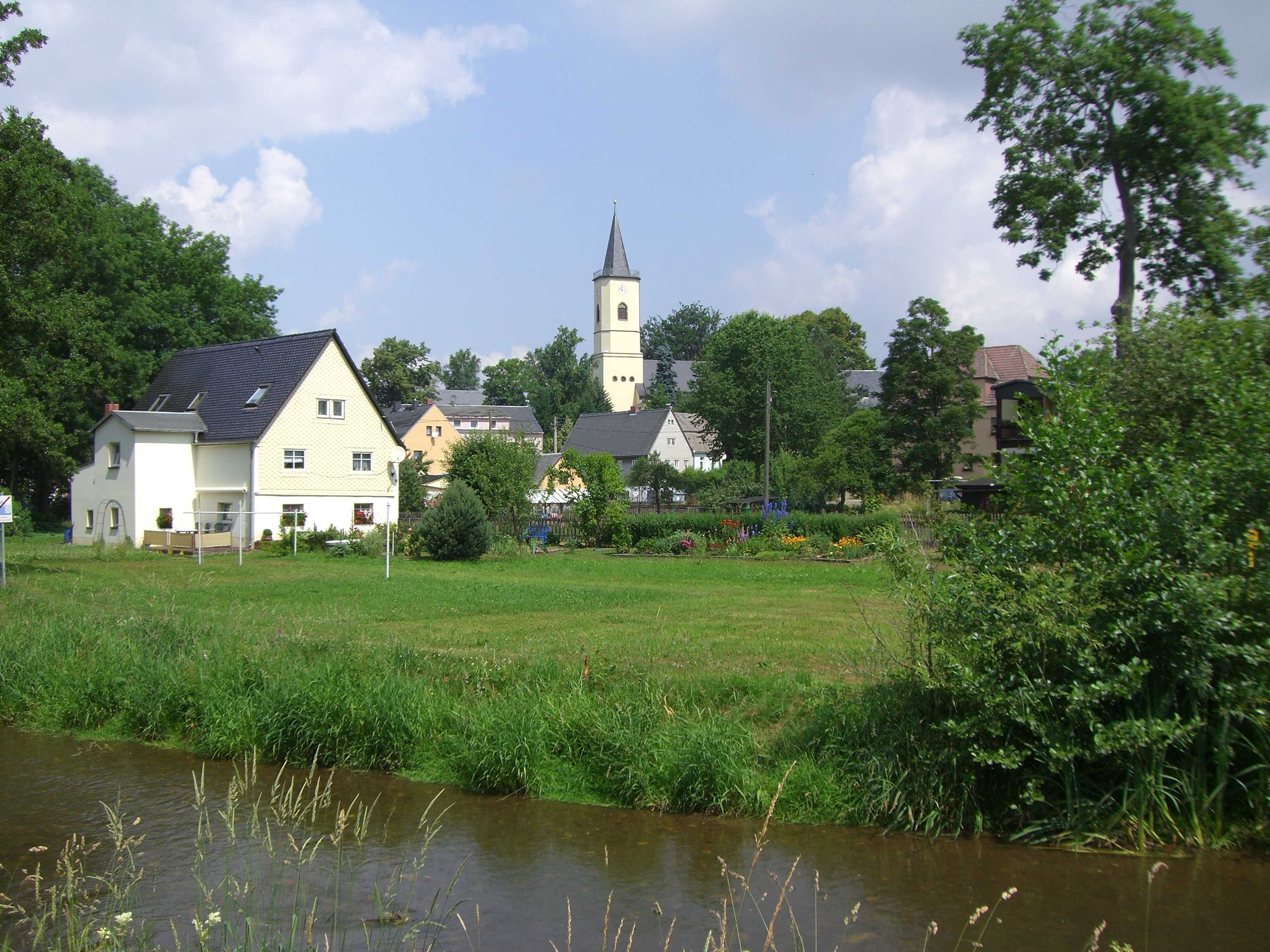 Ortsmitte